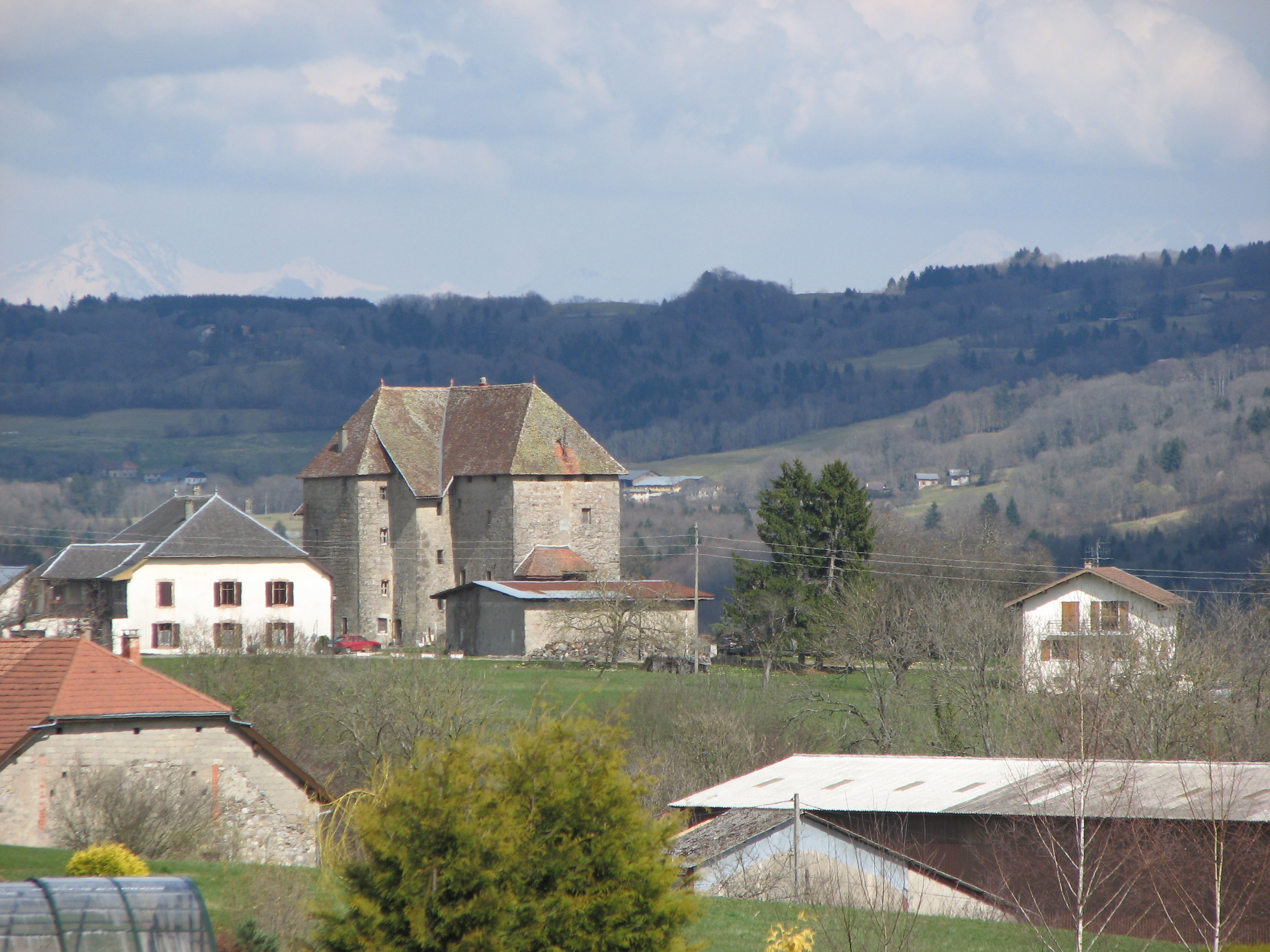 Le chateau de Boisy, à Groisy